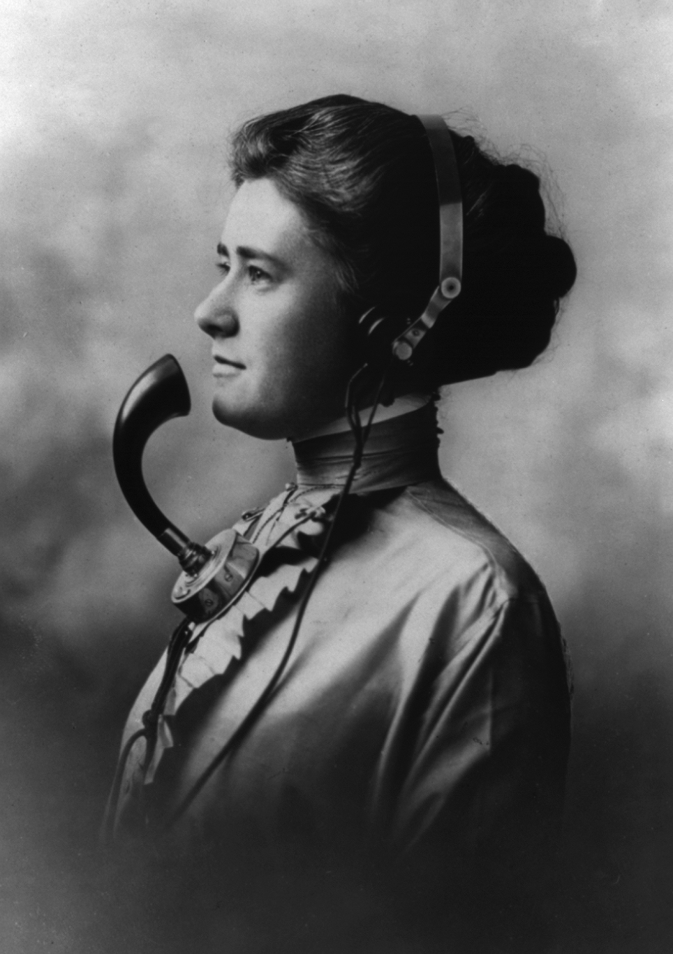 Telefonista, komunikaziorako beharrezkoa zen aparatua jantzita